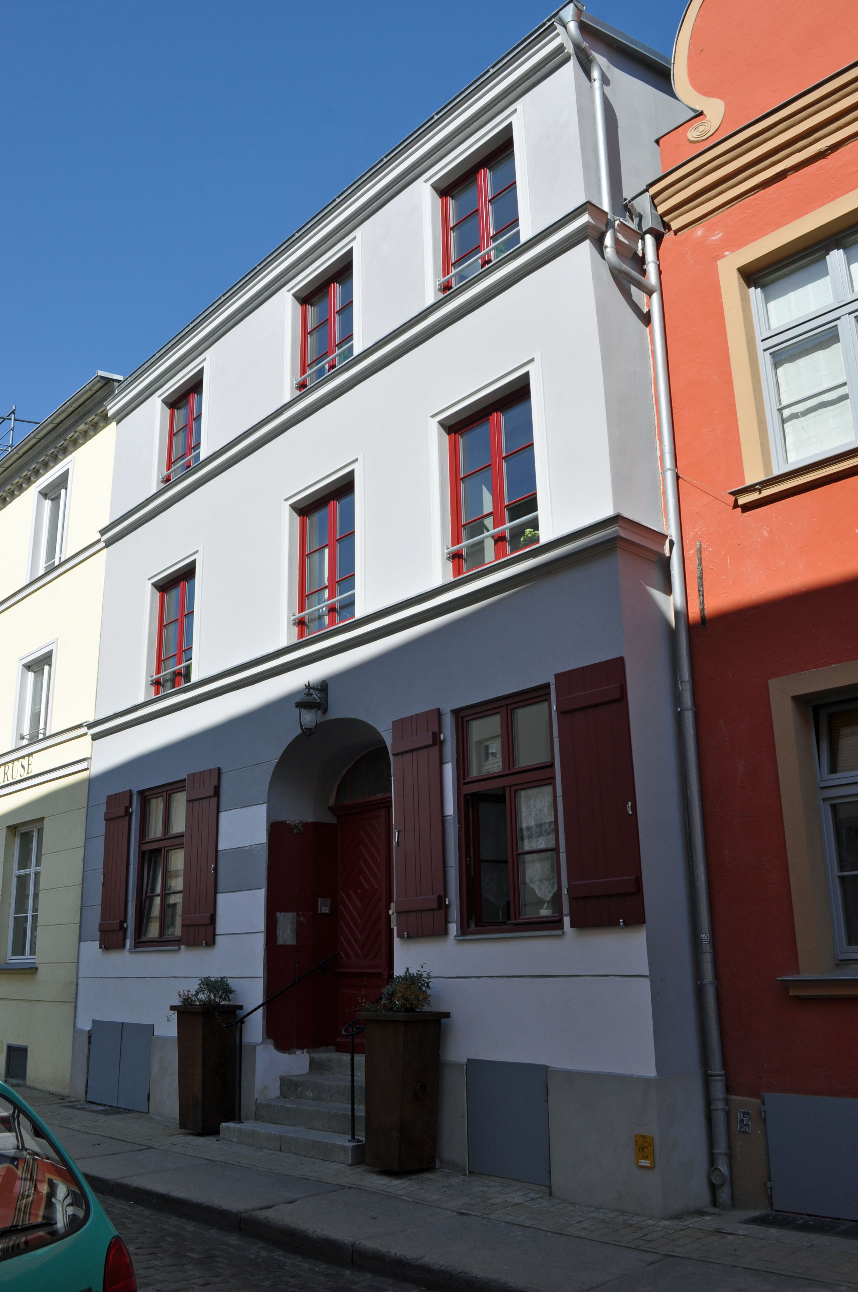 Gebäude bzw. Gebäudedetail in Stralsund. Straße und Hausnummer siehe Dateiname.